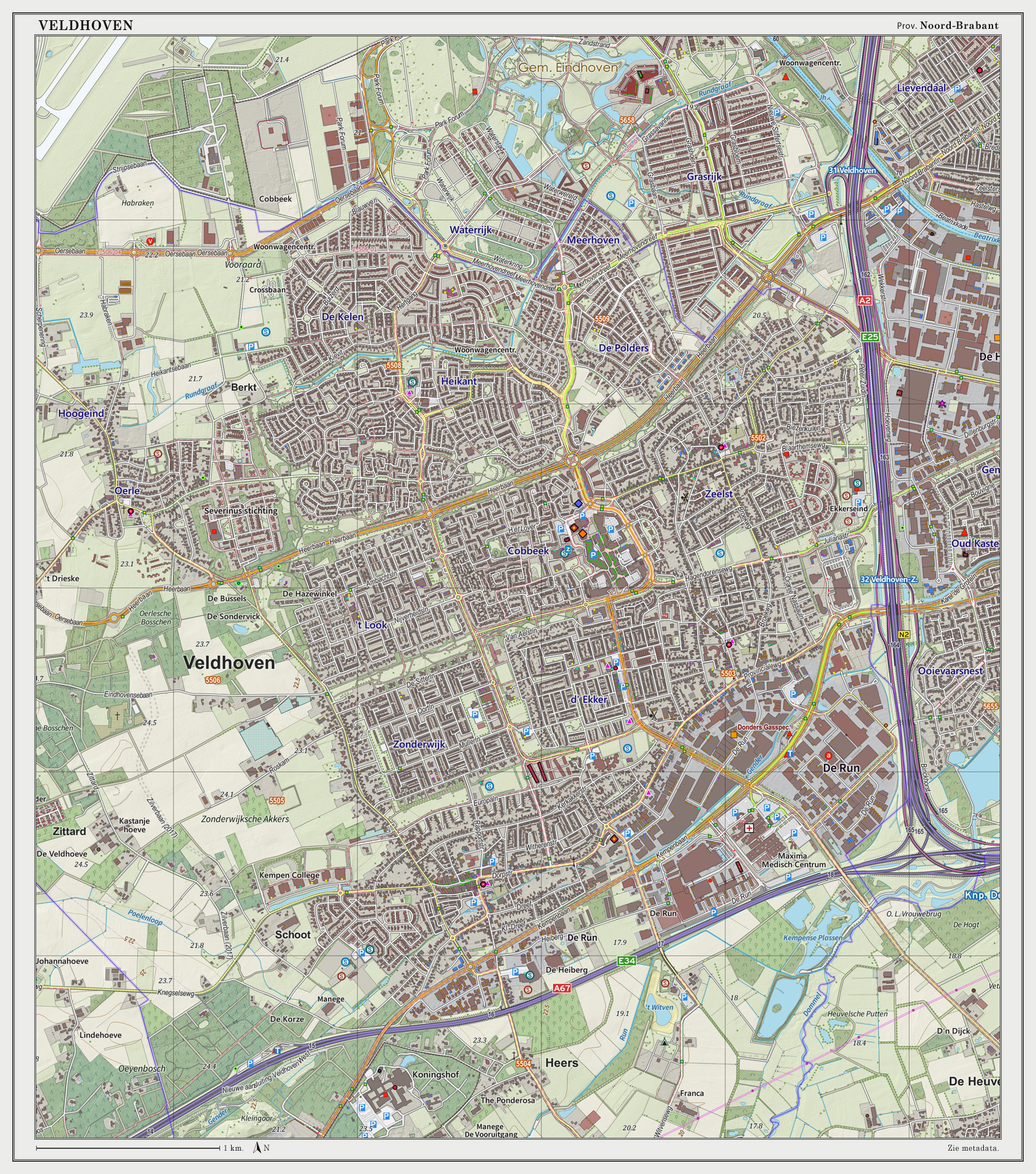 Topografische kaart van Veldhoven (woonplaats). Resolutie: 300 pixels/km. Kaartbeeld samengesteld uit de open geodata van de Top10NL en Top25namen (Basisregistratie Topografie, Kadaster), Creative Commons BY licentie. Gebouwvlakken uit open geodata BAG extract. Wegen uit de OpenStreetMap. Reliëfschaduw uit de Actuele Hoogtekaart AHN2. Samenstelling en kleurenschema: Jan-Willem van Aalst, met QGIS2. Zie ook de Legenda.